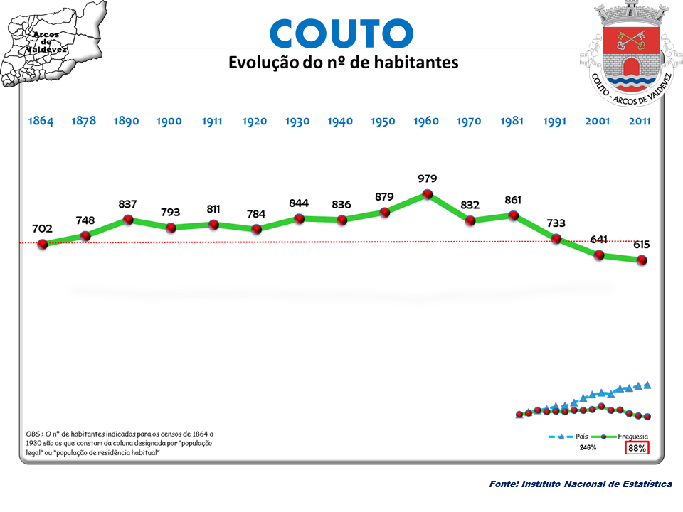 Censos 1864/2011